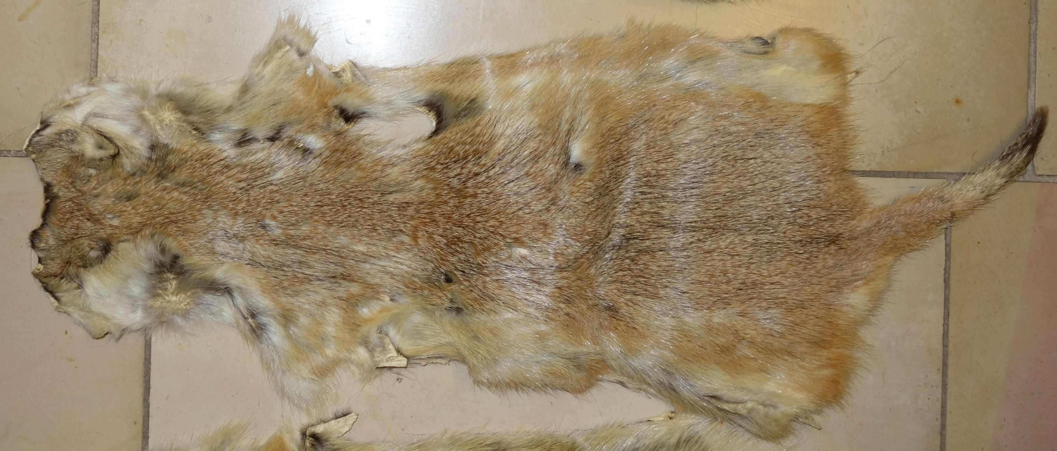 3 Suslikifelle